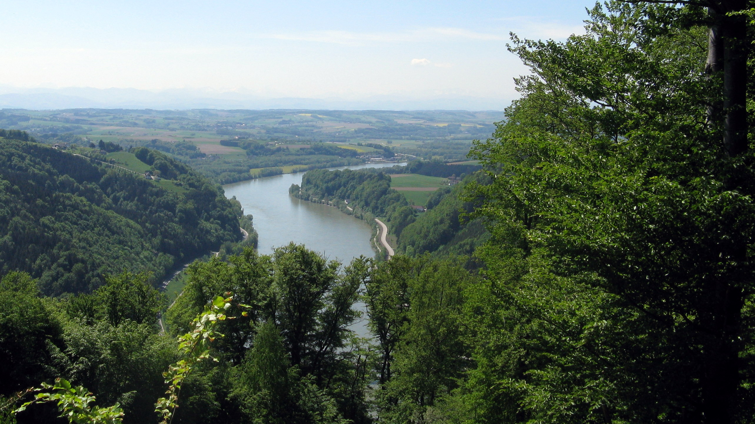 Ausblick Donautal Machland vom Gipfelstein am Matras-Steig